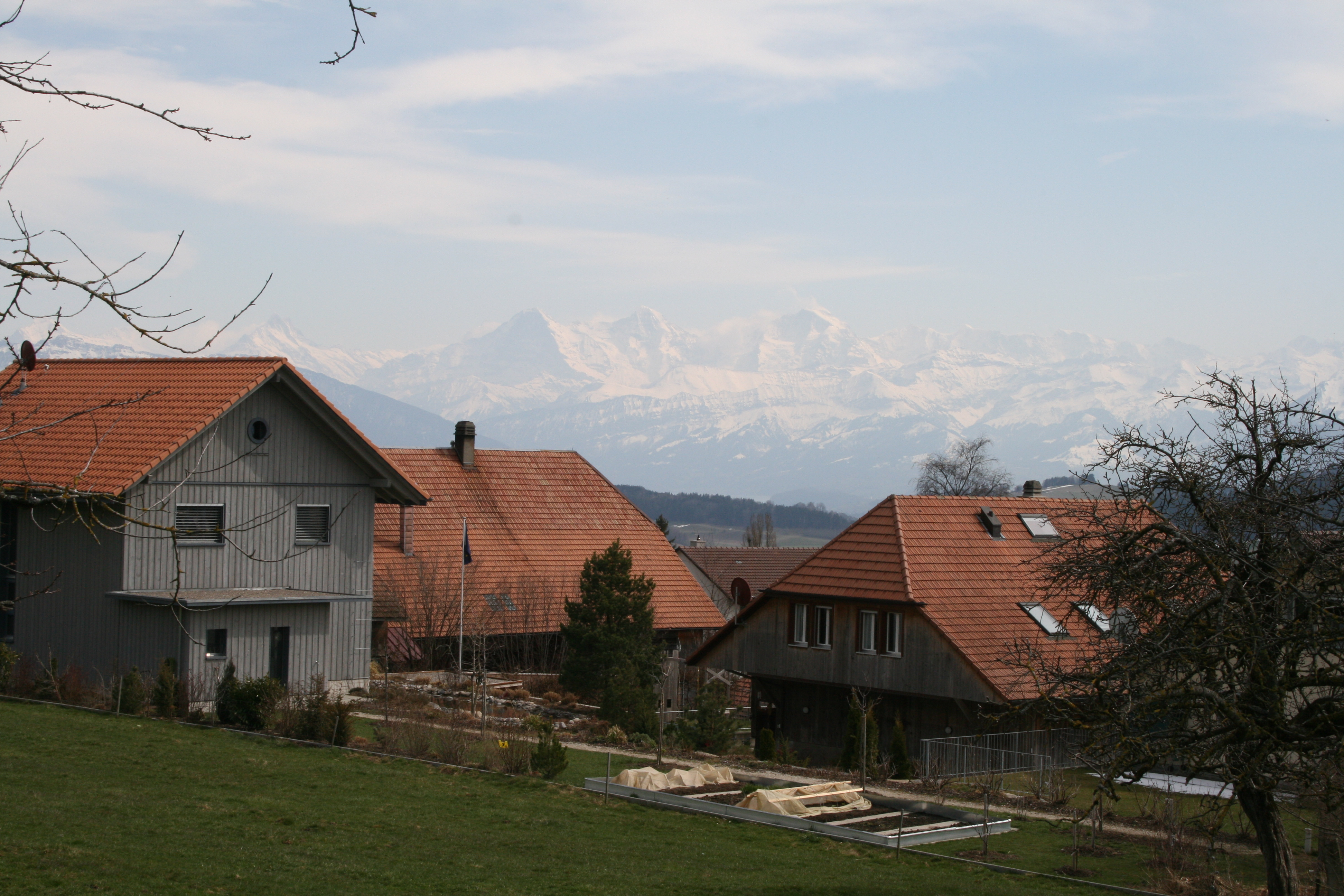 Rüeggisberg